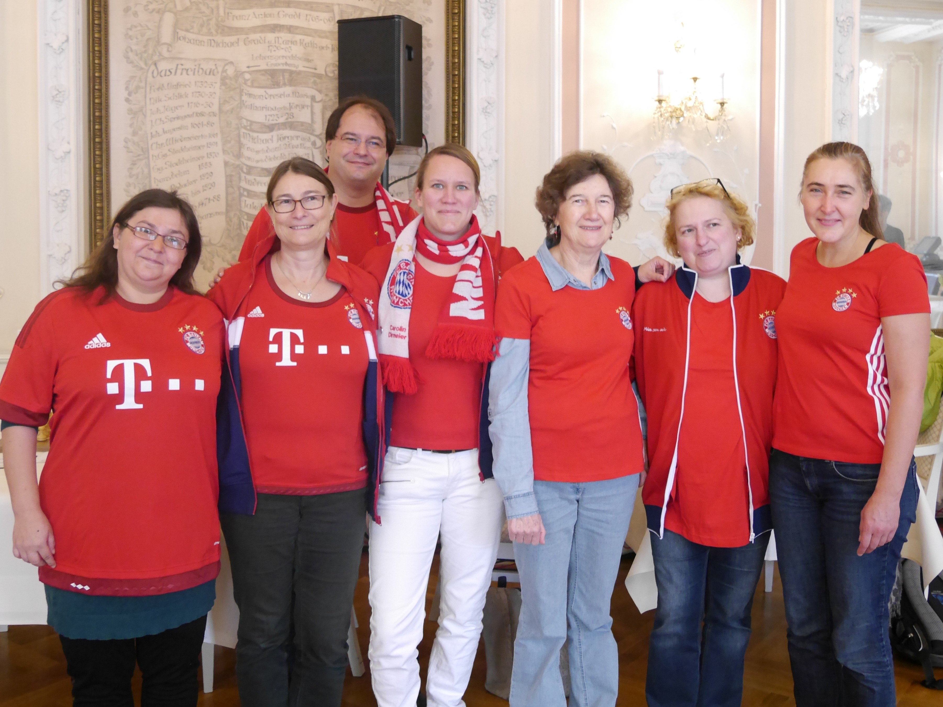 FC Bayern München, Schachbundesliga der Frauen 2016/17 in Baden-Baden. Von links nach rechts: Barbara Niedermaier, Karin Roos, MF, Carolin Dirmeier, Milka Ankerst, Nellya Vidonyak und Marianne Spiel